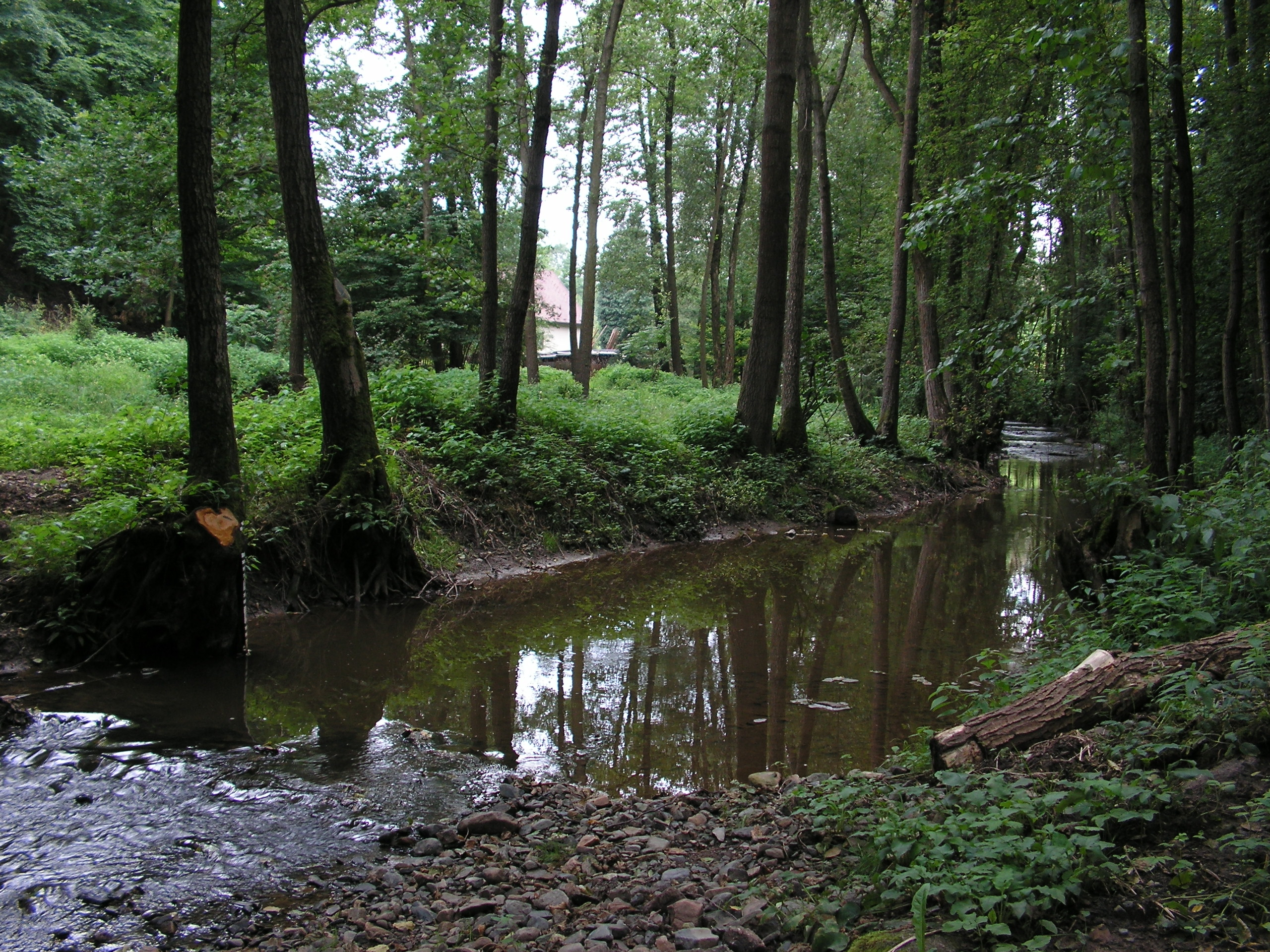 Tloskovský potok nedaleko ústí do Janovického potoka